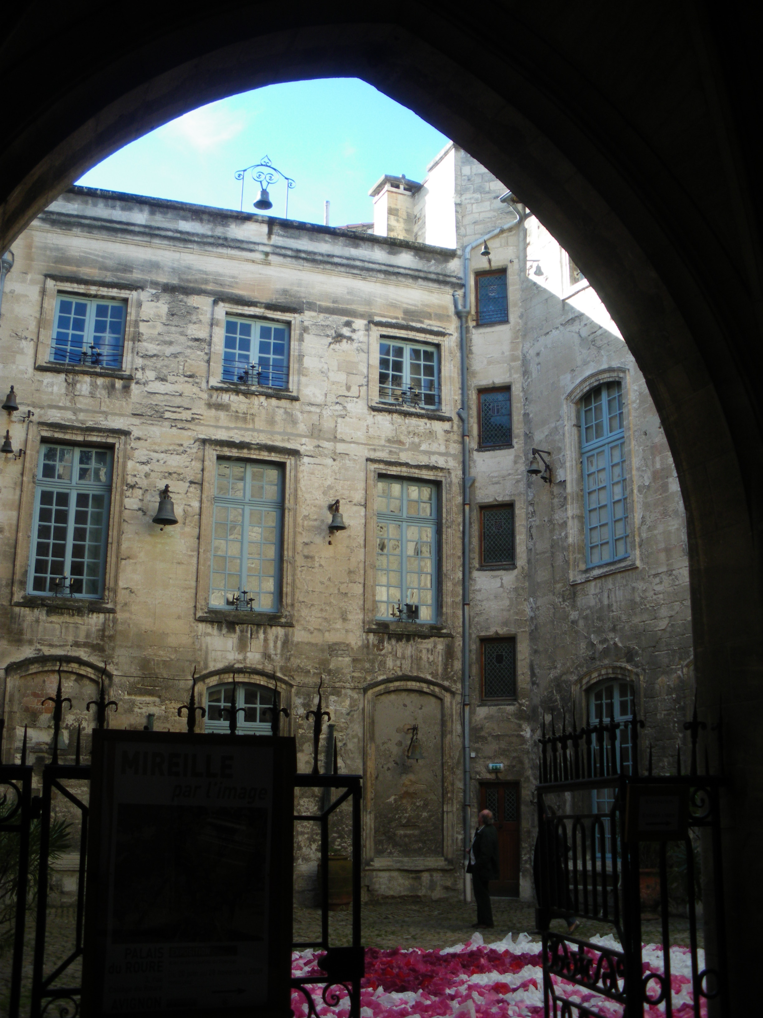 Cour intérieur du Palais du Roure, Avignon, France